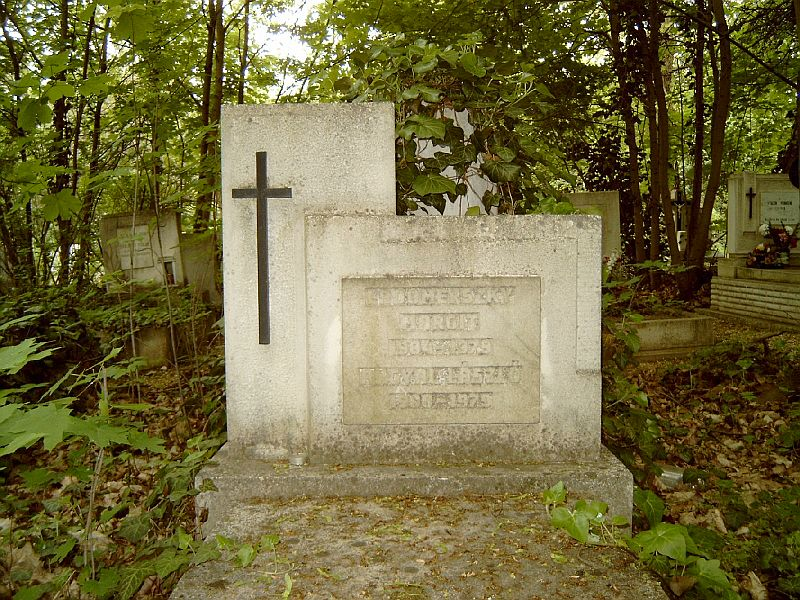 Ladomerszky Margit (Bp., 1904. dec. 17. – Bp., 1979. okt. 10.) színésznő sírja Budapesten. Új köztemető: 158/11-1-9.